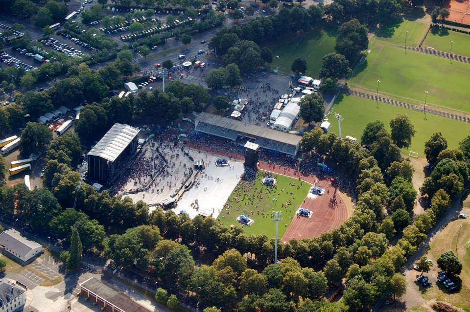 Das Willy-Sachs-Stadion in Schweinfurt - drei Stunden vor dem Konzert der "Toten Hosen" am 20. Juli 2013